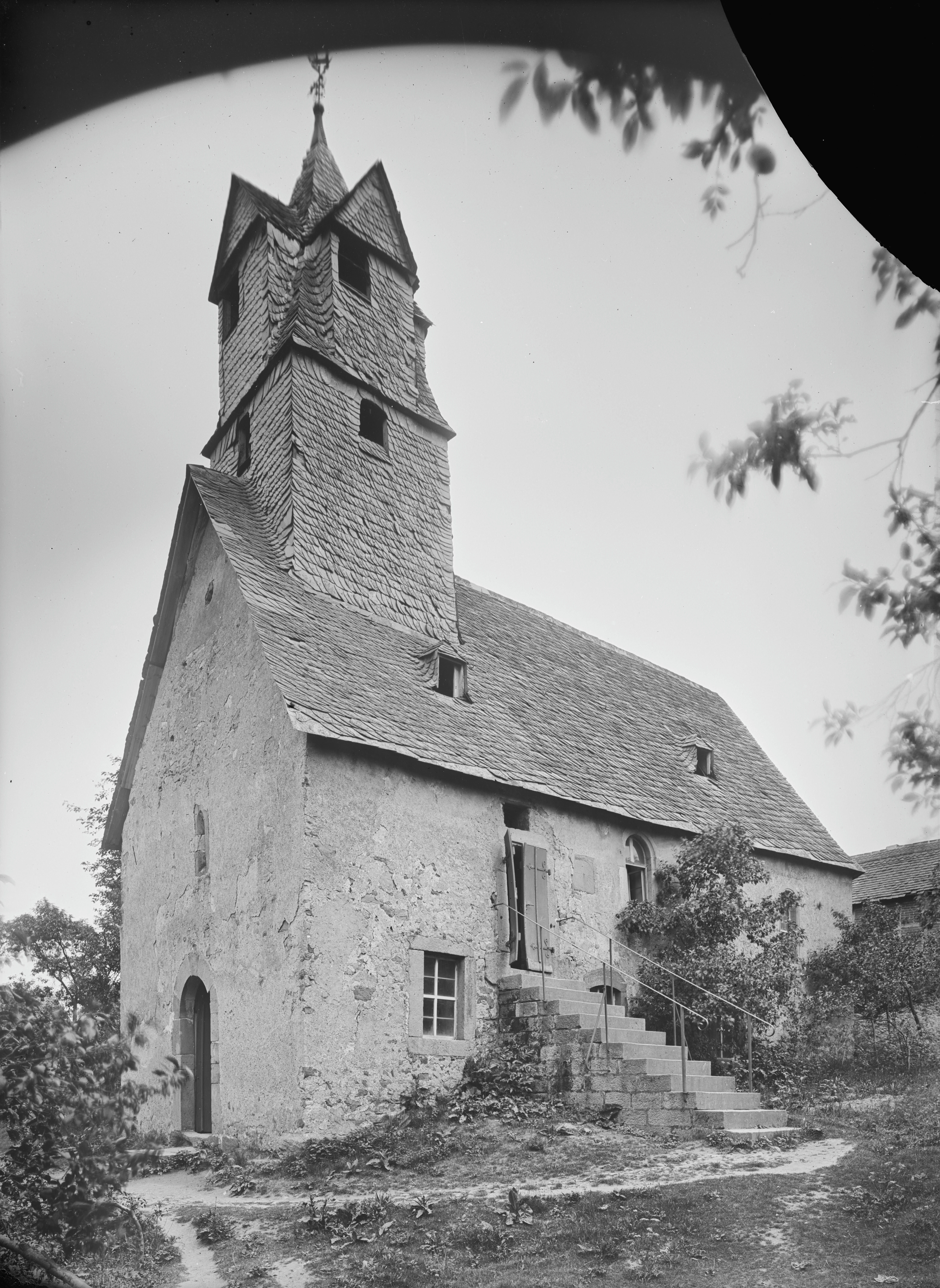 Evangelische Kirche Marburg-Cappel, Landkreis Marburg-Biedenkopf, Hessen, Deutschland